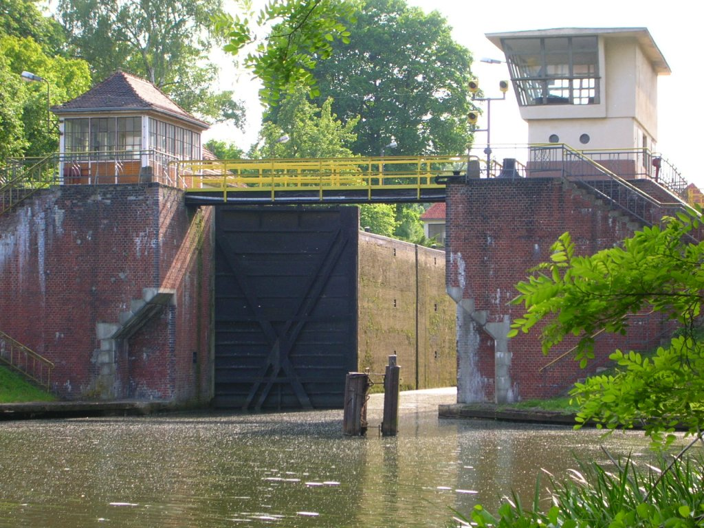 Śluza Czyżkówko w Bydgoszczy